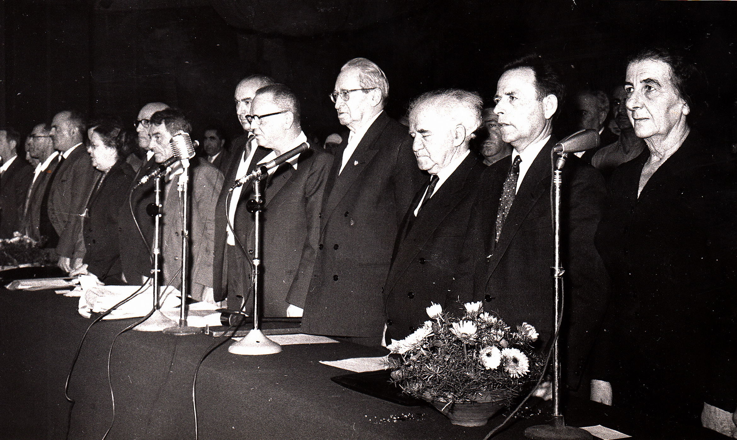 מימין לשמאל - ג. מאיר א. בקר בן גוריון בן צבי ז. און נמיר ק. לוז ב. אידלסון. וועידת ההסתדרות התשיעית 2.2.1960 תל אביב